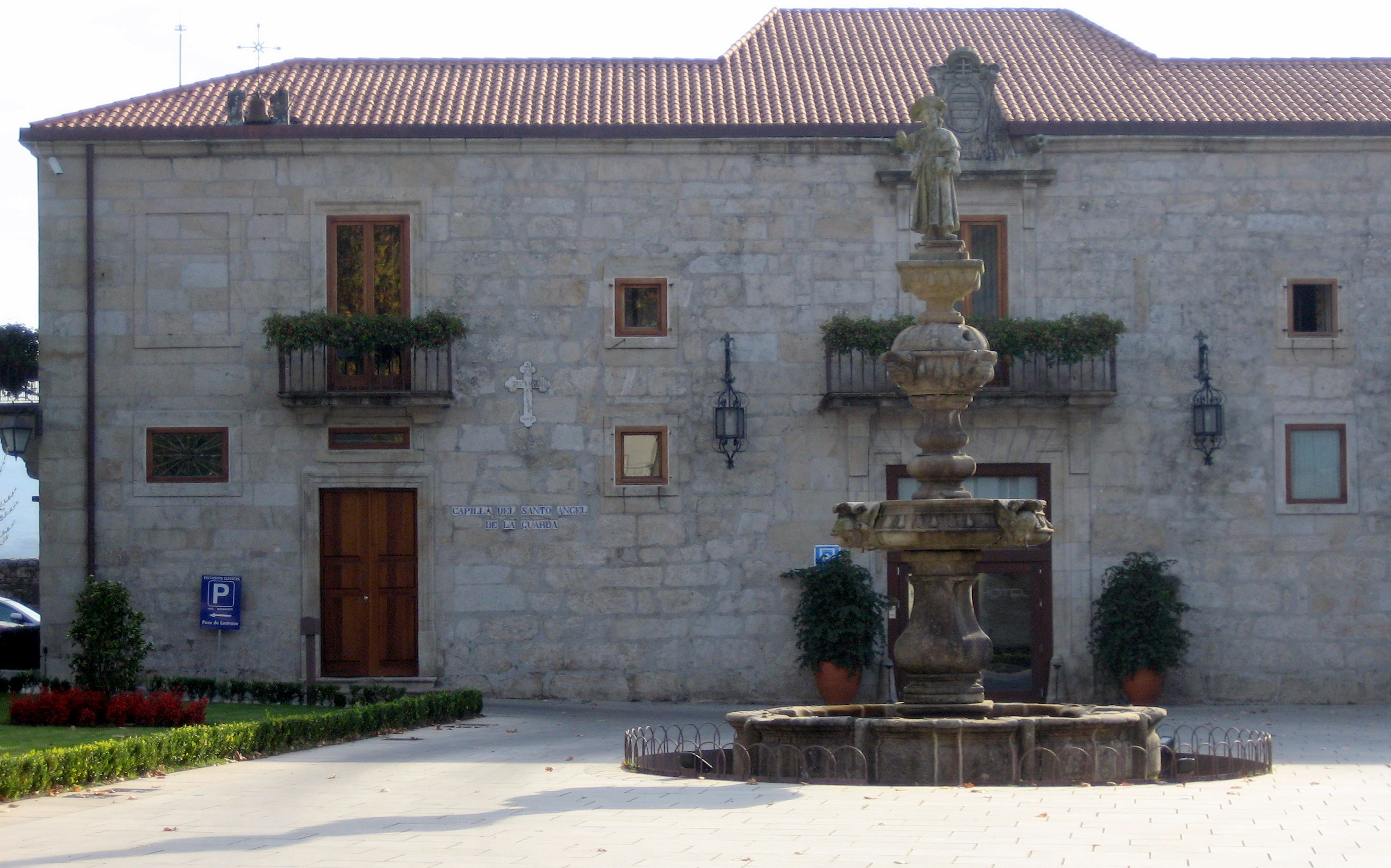 Pazo Lestrove Dodro